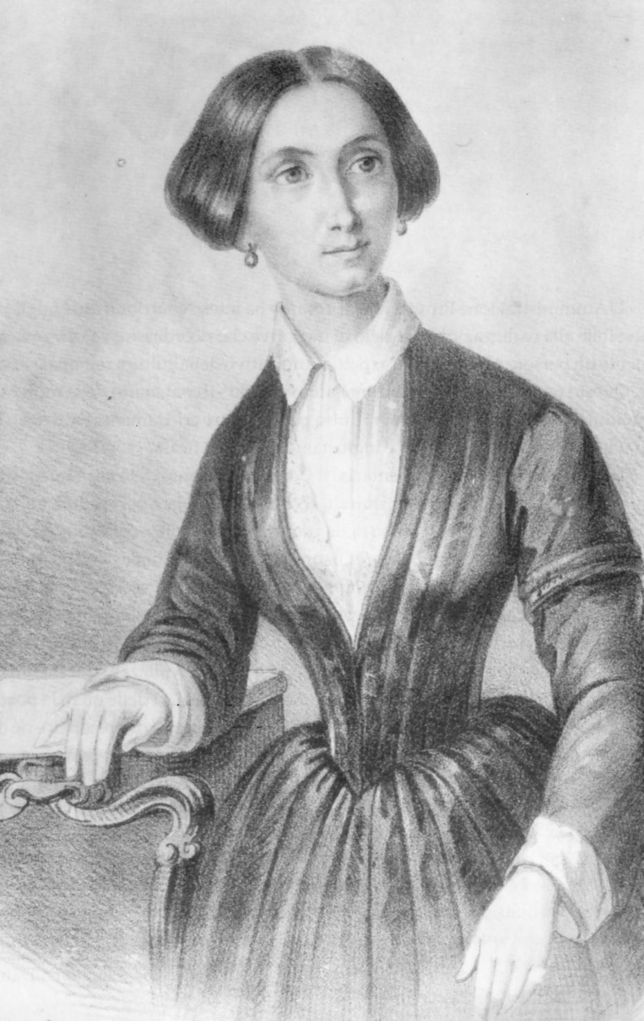 autore sconosciuto, da Poliorama Pittoresco, ritratto di Giannina Milli-incisione, opera il cui autore è morto da più di 70 anni, acquisita da scanner